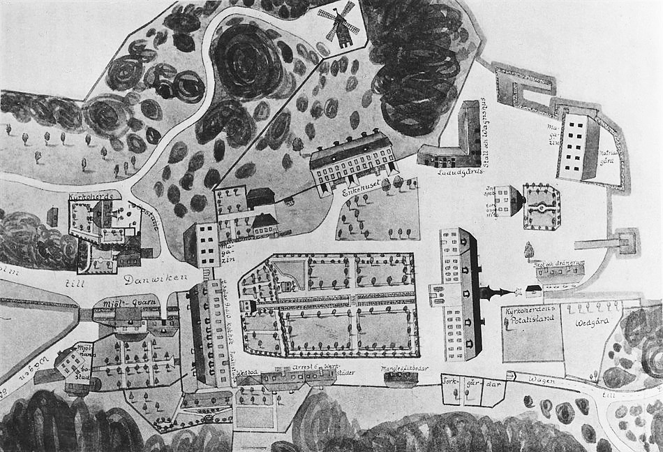 Karta över Danvikens Hospital med omgivningar från 1848. Västerut är uppåt i bilden. Fotograf Nils Lagergren, Rikantikvarieämbetet. Kartan är ritad av H.P Hofstedt.